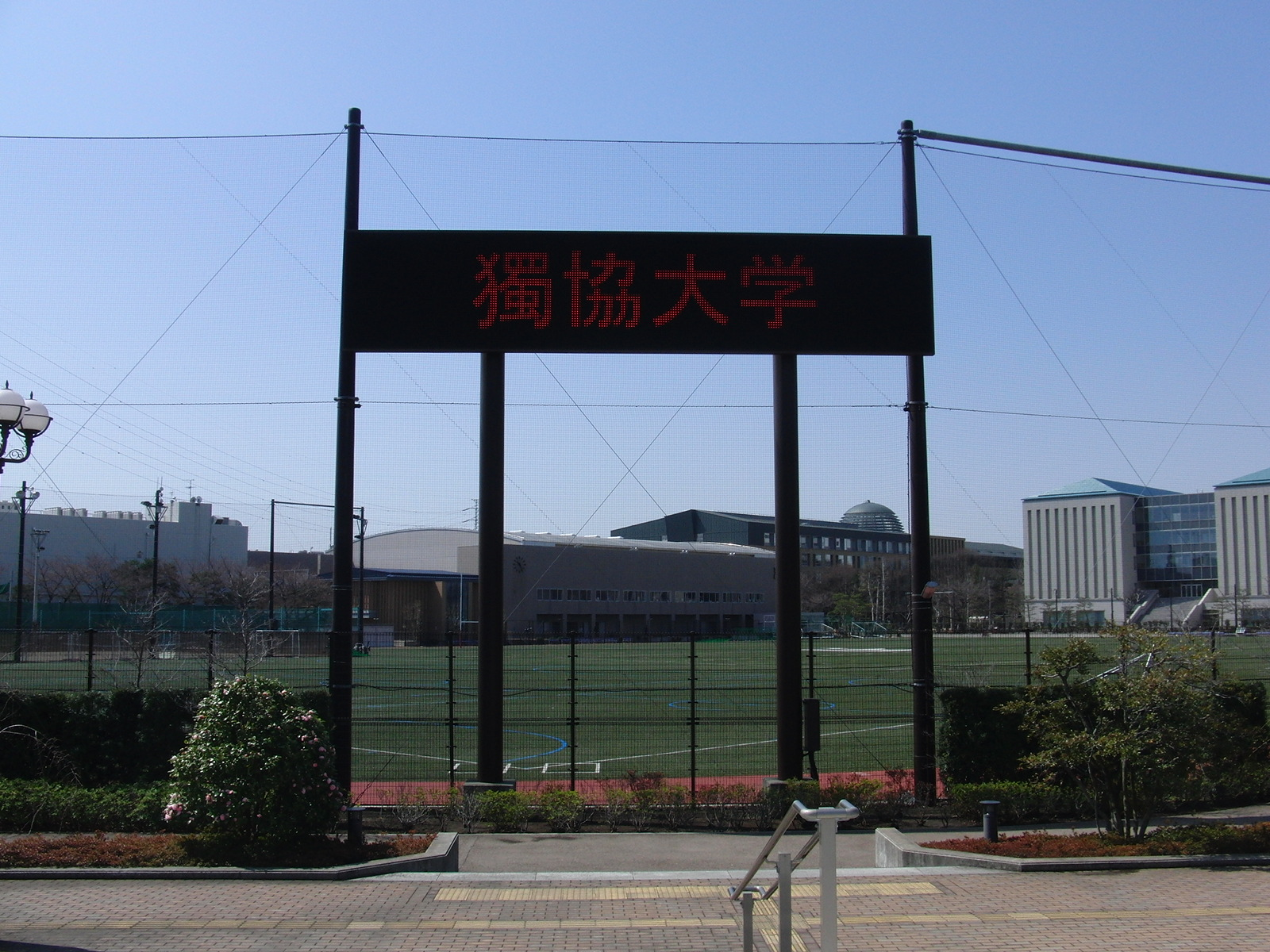 獨協大学キャンパス